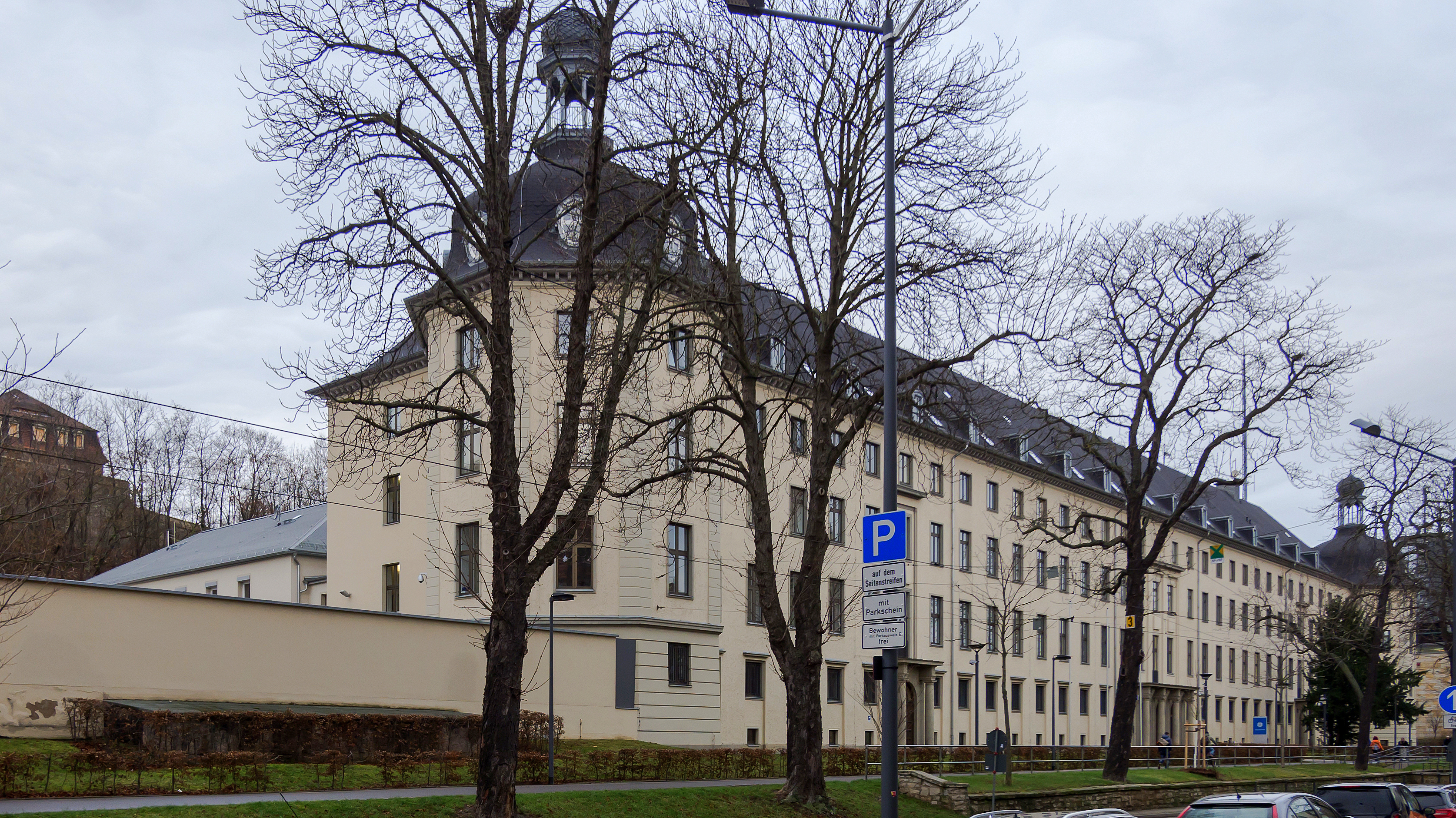 Erfurt Andreasstrasse 38 Verwaltungsgebäude 1